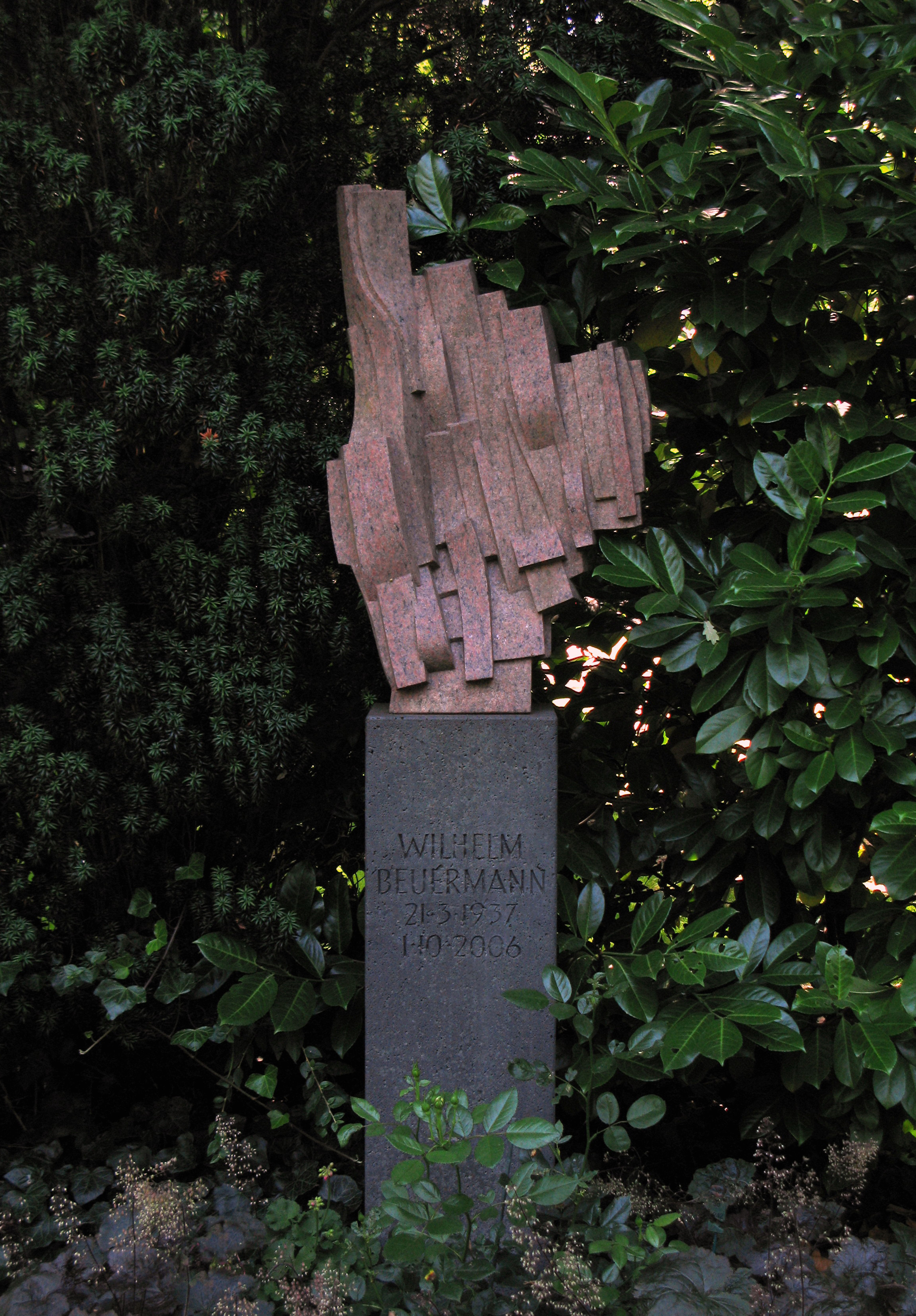 Grabstein von Wilhelm Beuermann